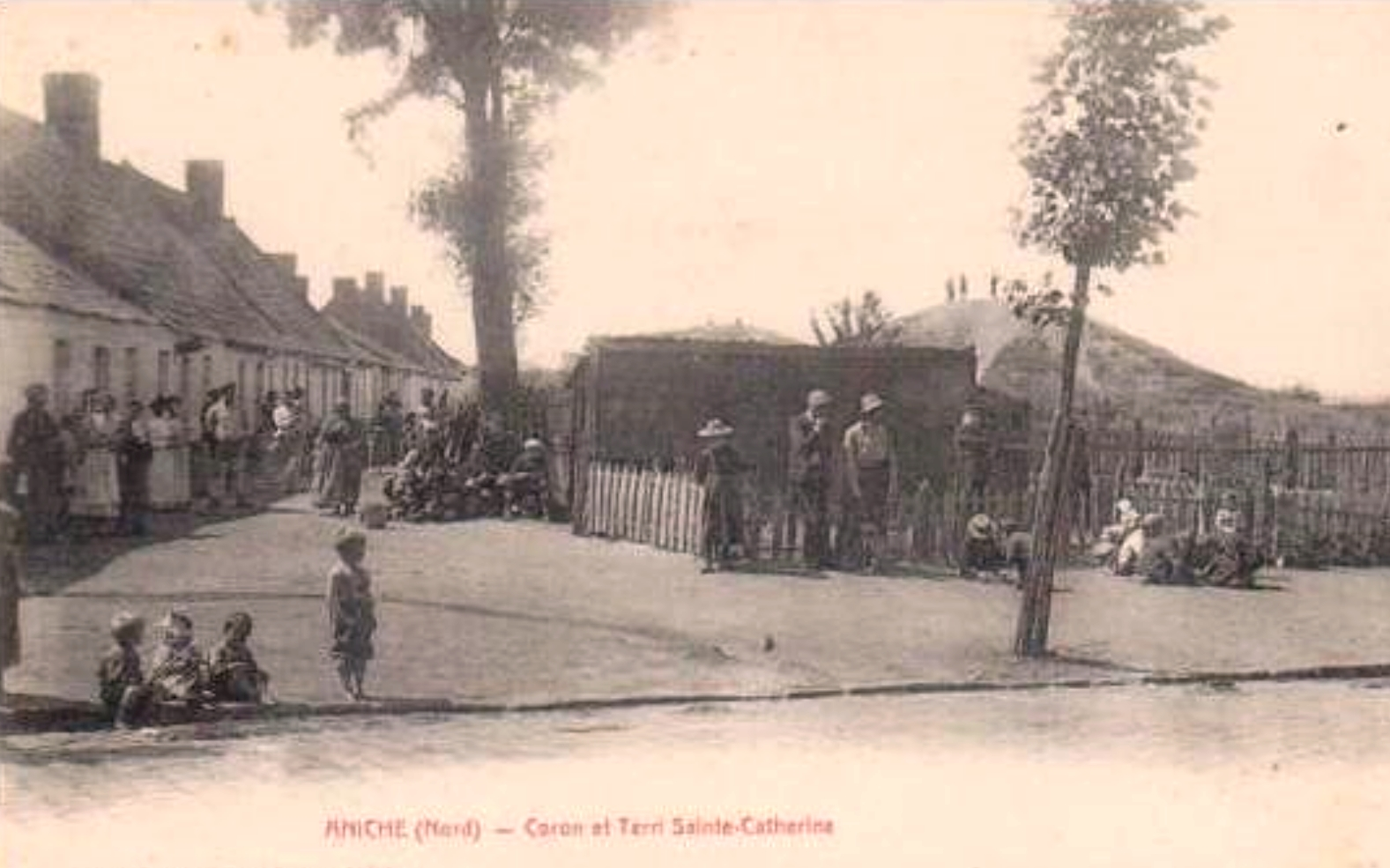 Coron et terril Sainte Catherine, Aniche, Nord, Nord-Pas-de-Calais, France.